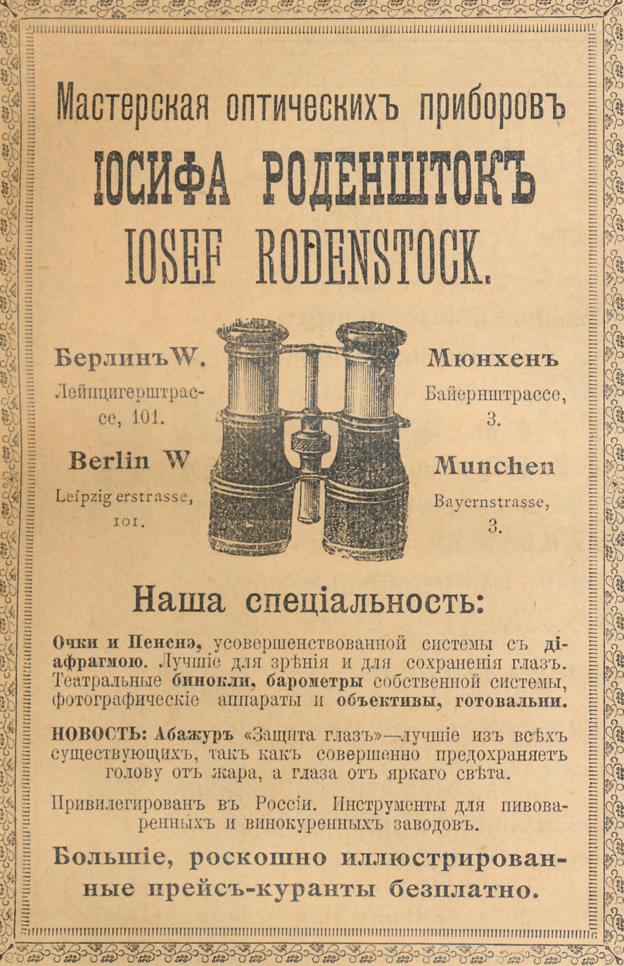 Реклама приборов Иосифа Роденштока, 1899 год.